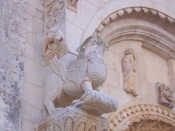 Abbazia di San Leonardo in Lama Volara (Manfredonia)